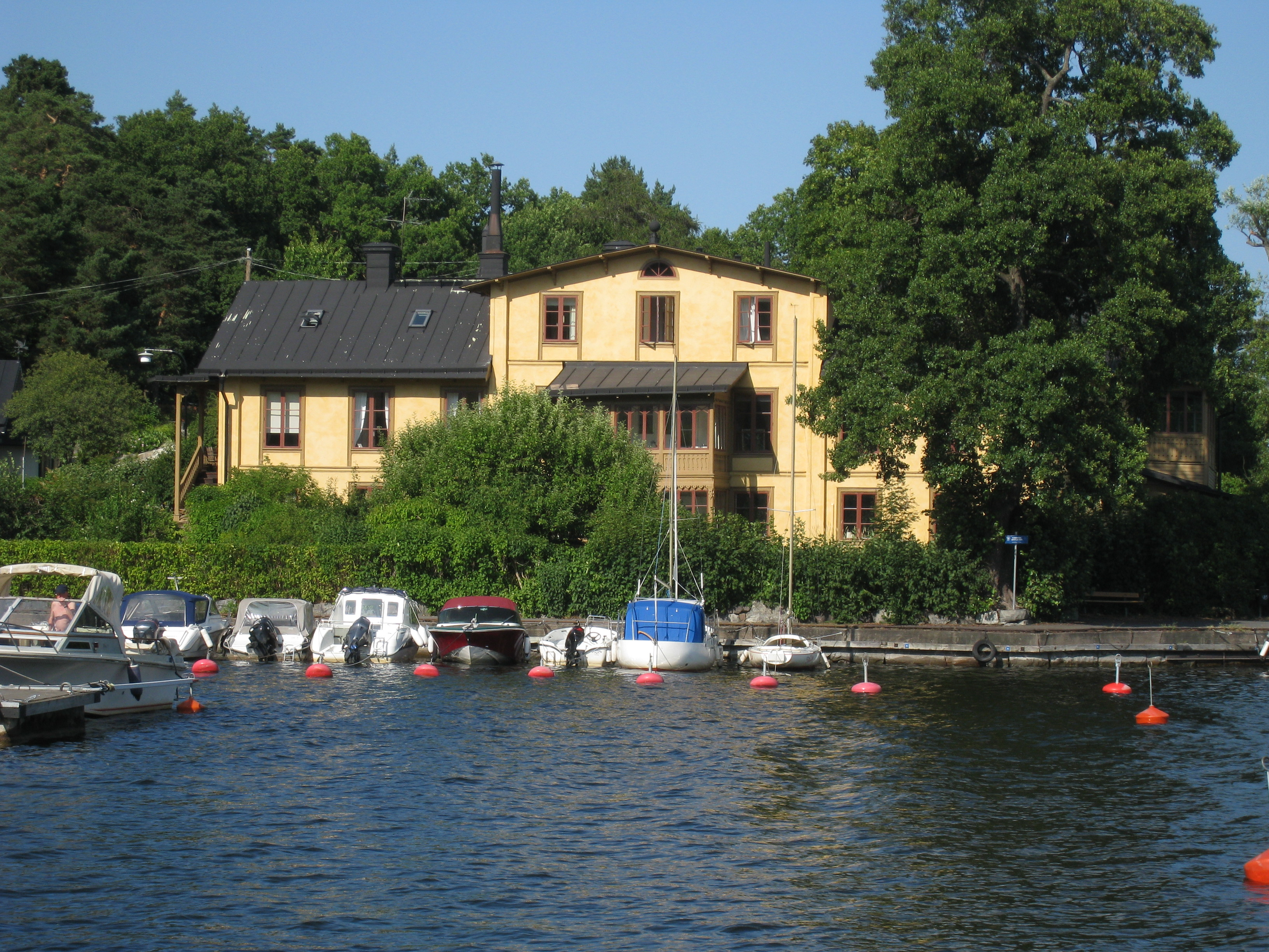 Stora sjövillan i Äppelviken i Bromma tillhör "Mälarstrandens sommarbebyggelse". Bryggaren Lars Fredrik Blackstadius byggde 1847 ett tvåvåningshus för att tillverka brännvin. År 1864 byggde han om huset till sitt corps de logi. Det fick namnet "Stora Sjövillan".